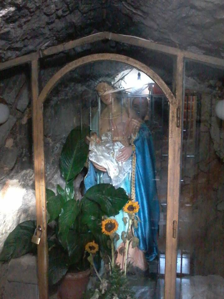 Madonna di Gibilrossa festeggiata il 15 agosto